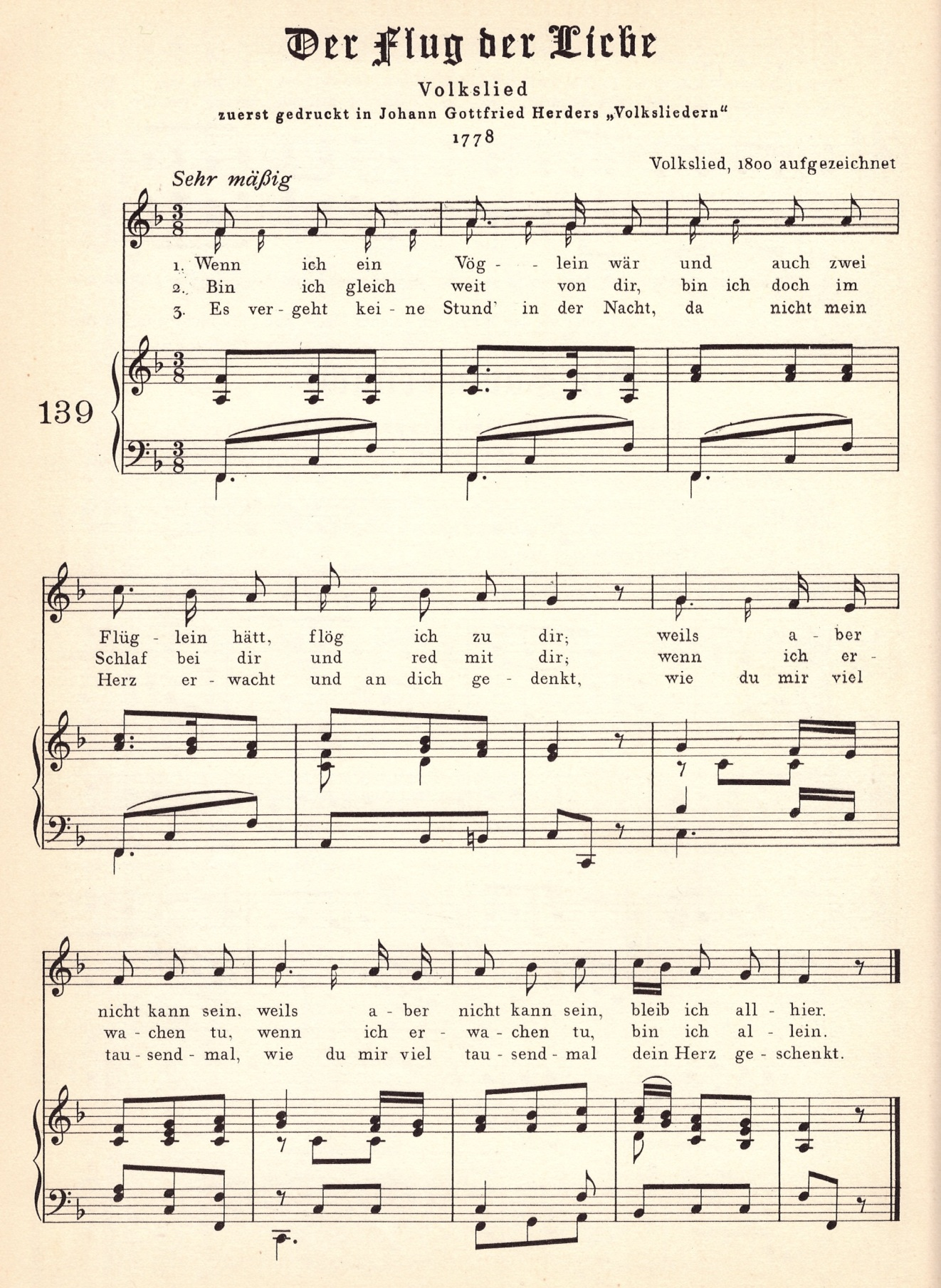 Wenn ich ein Vöglein wär, Klaviersatz von Max Friedlaender